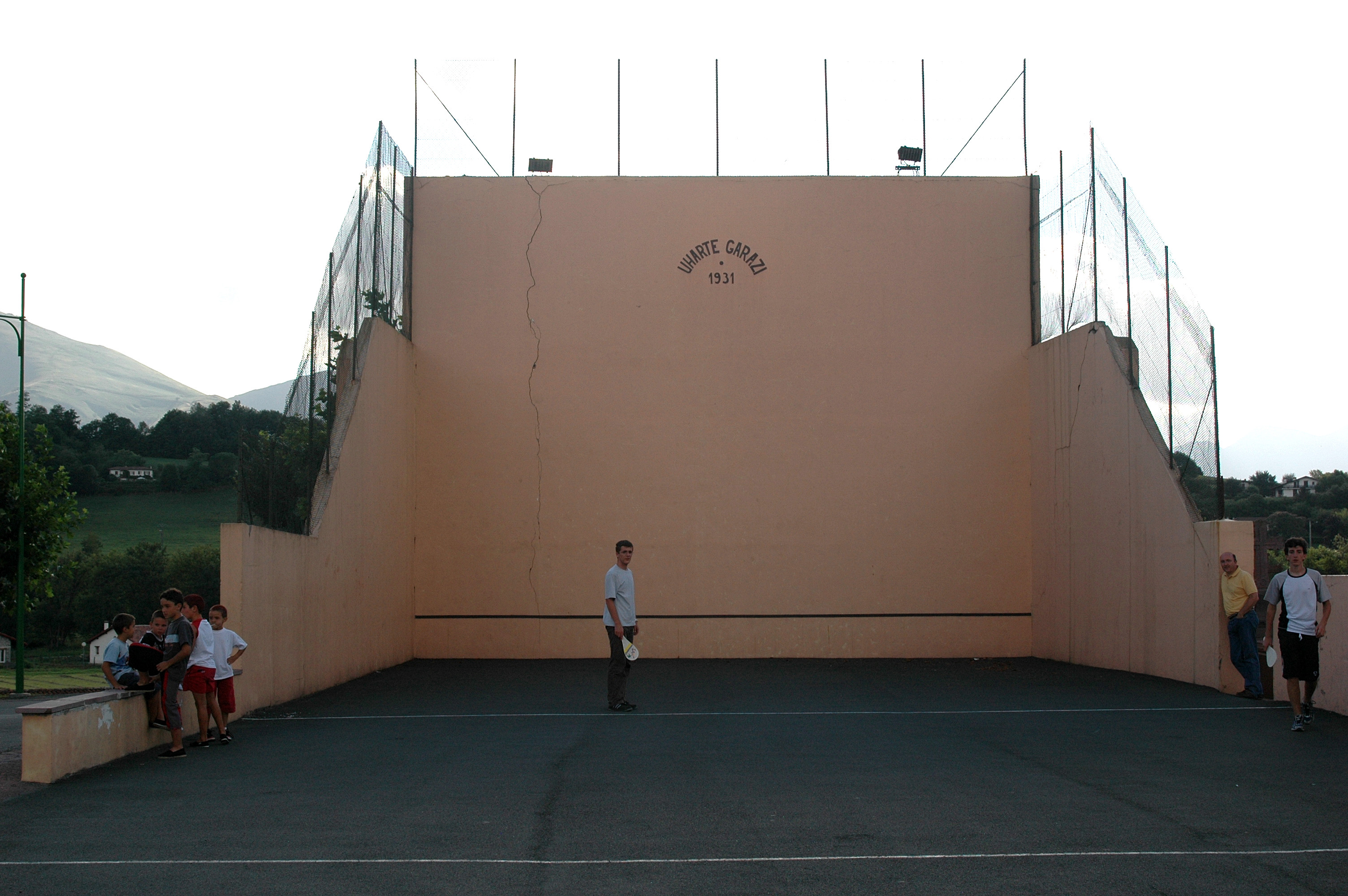 Uhart-Cize, le fronton. Photo prise le 03/08/06 par Harrieta171